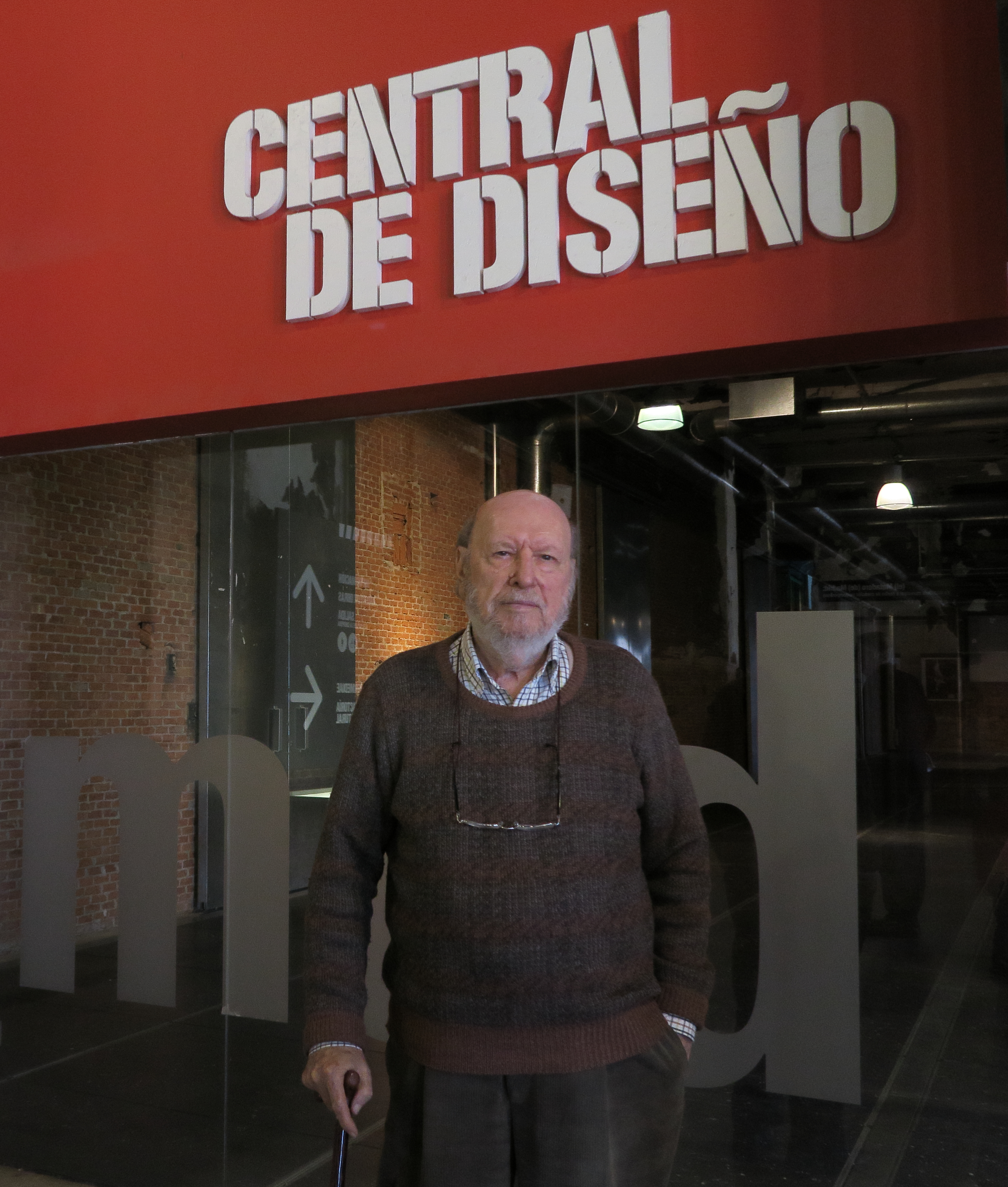 José Luis Sánchez Fernández